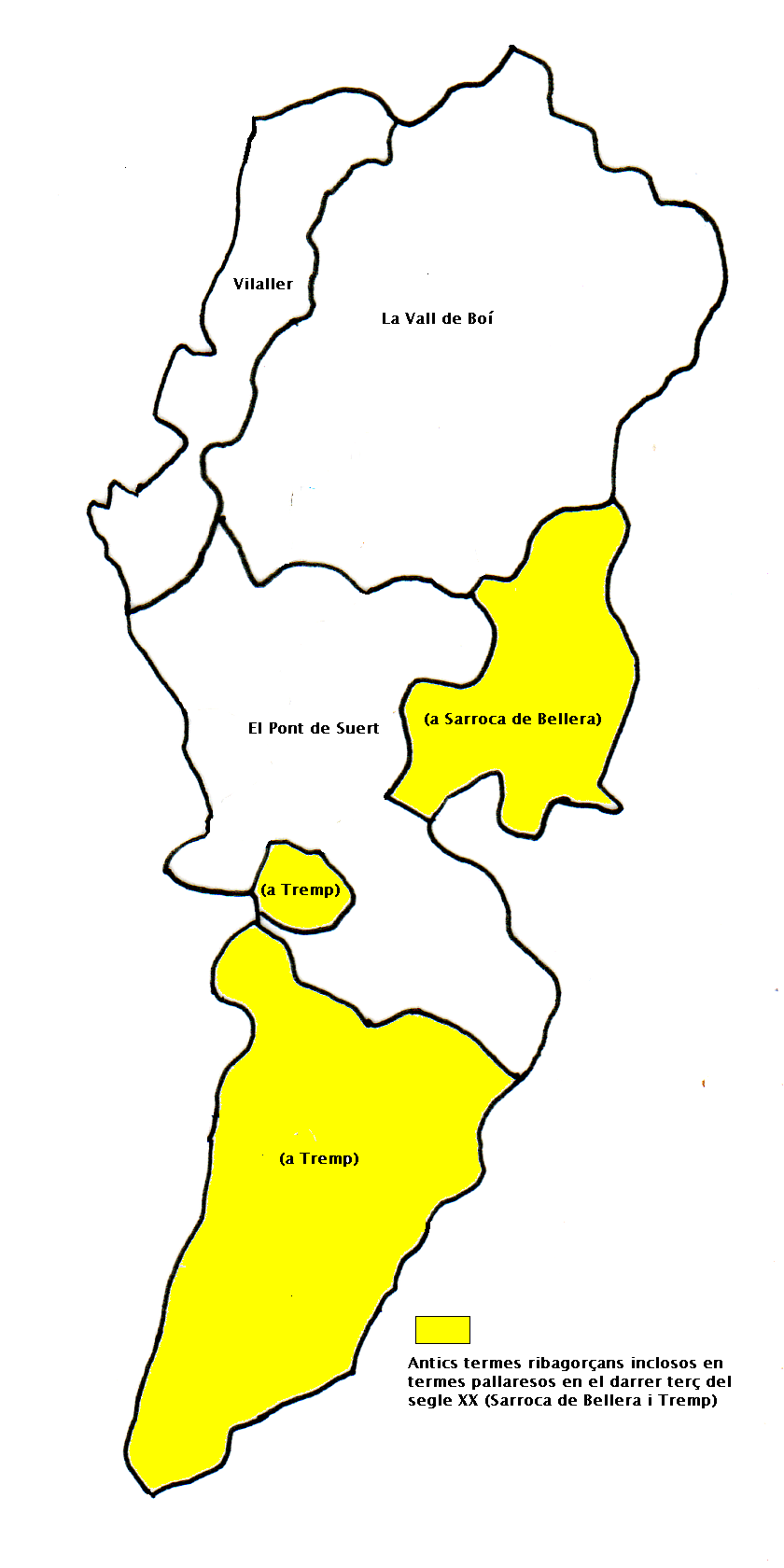 Mapa de l'Alta Ribagorça del 2000, amb els seus tres municipis.